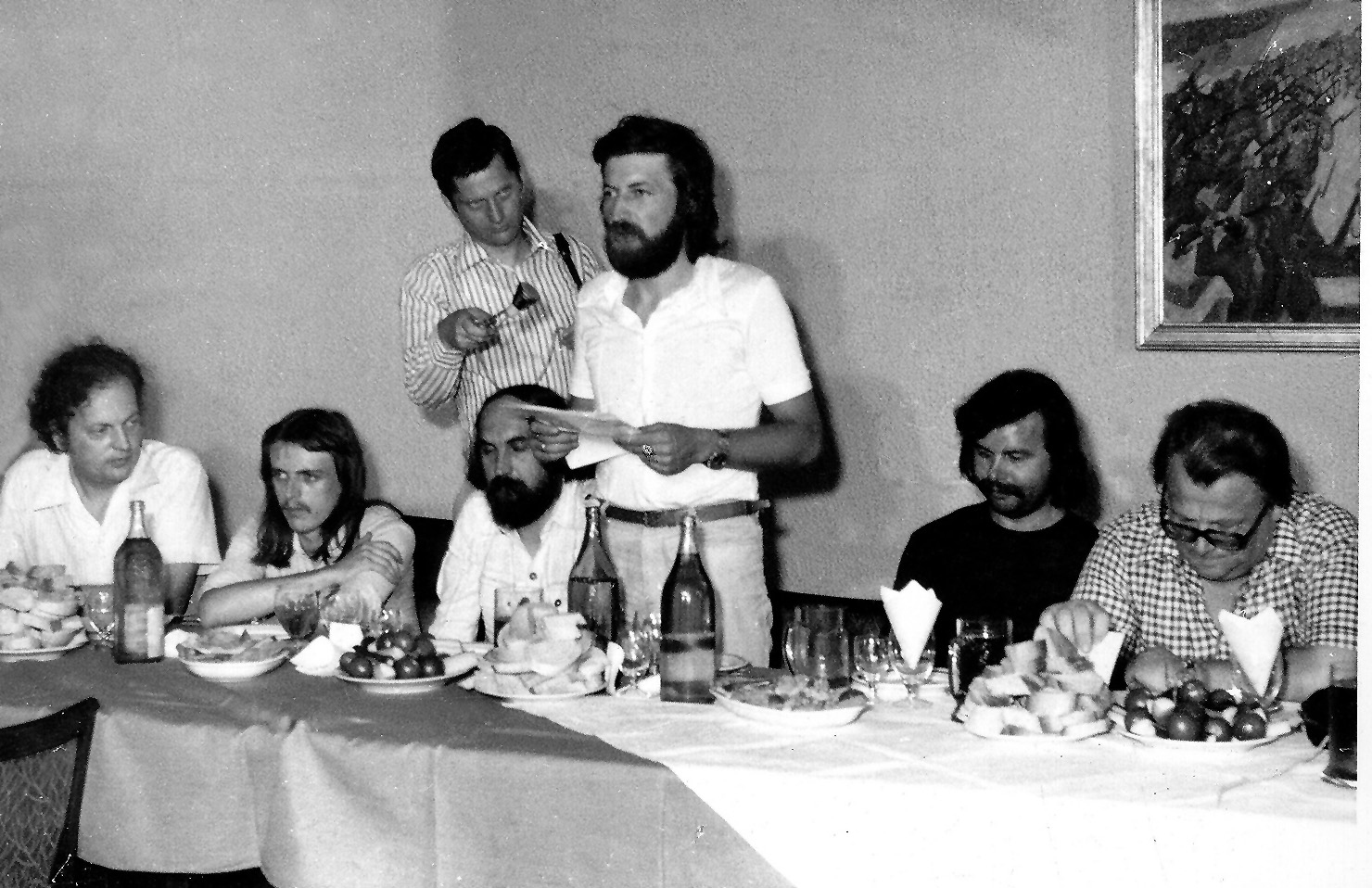 Der mit dem "Adam-Müller-Guttenbrunn"-Literaturpreis der Temeswarer Schriftstellervereinigung ausgezeichnete Autor Horst Samson hält die Dankesrede (Zeitungshaus, damals Boulevard der Republik, Temeswar, 1982). Im Bild (v.l.): NBZ-Feuilletonchef Eduard Schneider (hielt die Laudatio auf Horst Samson), Helmuth Frauendorfer, William Totok (stehend mit Mikrophon Franz Binder, Redakteur von Radio Temeswar), der Preisträger Horst Samson, Richard Wagner (stellvertretender Vorsitzender des AMG), und Nikolaus Berwanger (Vorsitzender des Literaturkreises "Adam Müller-Guttenbrunn", AMG. (Foto Archiv Samson)